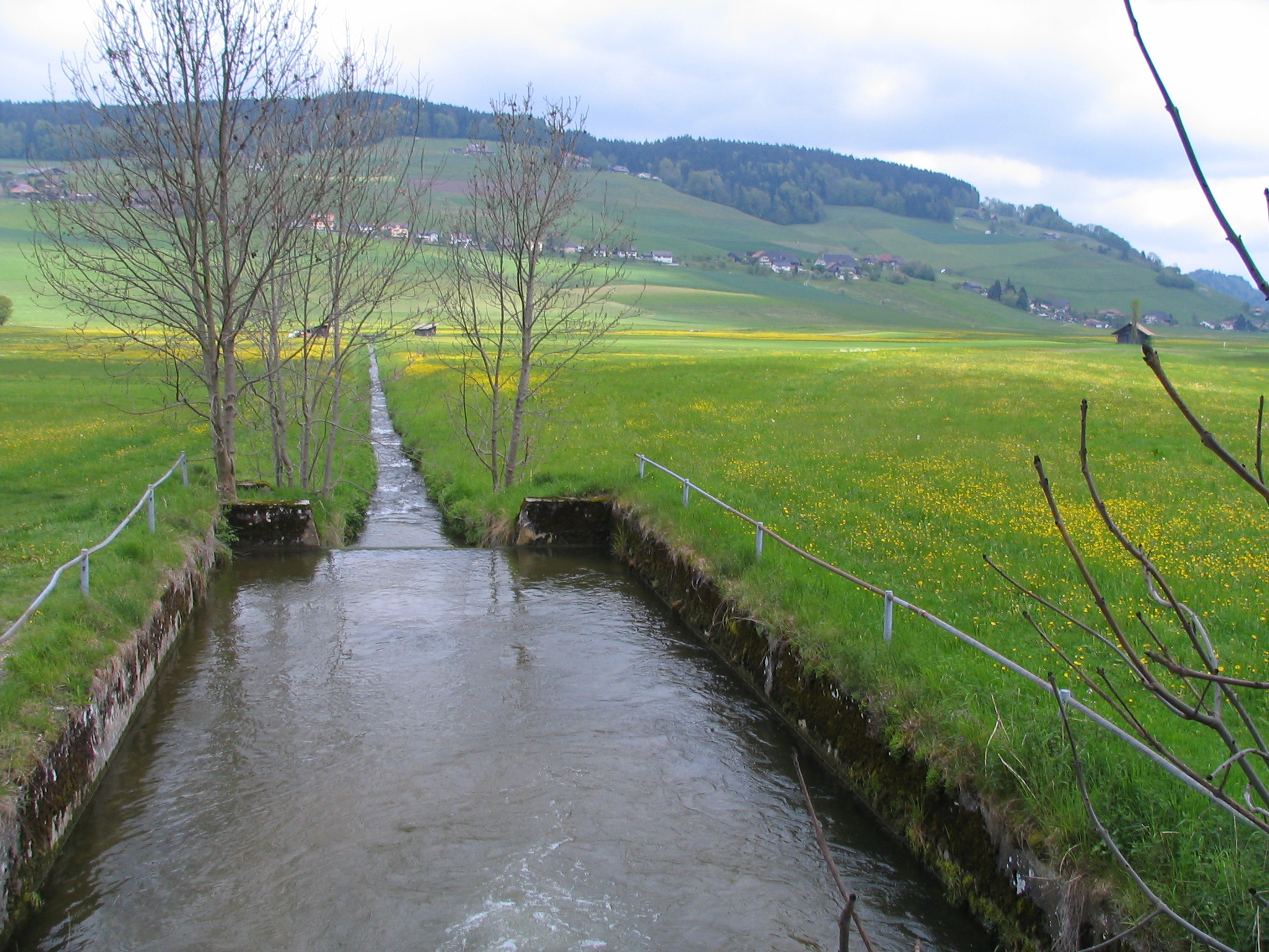 Biglenbach nach der Verzweigung zum Enggisteinbach